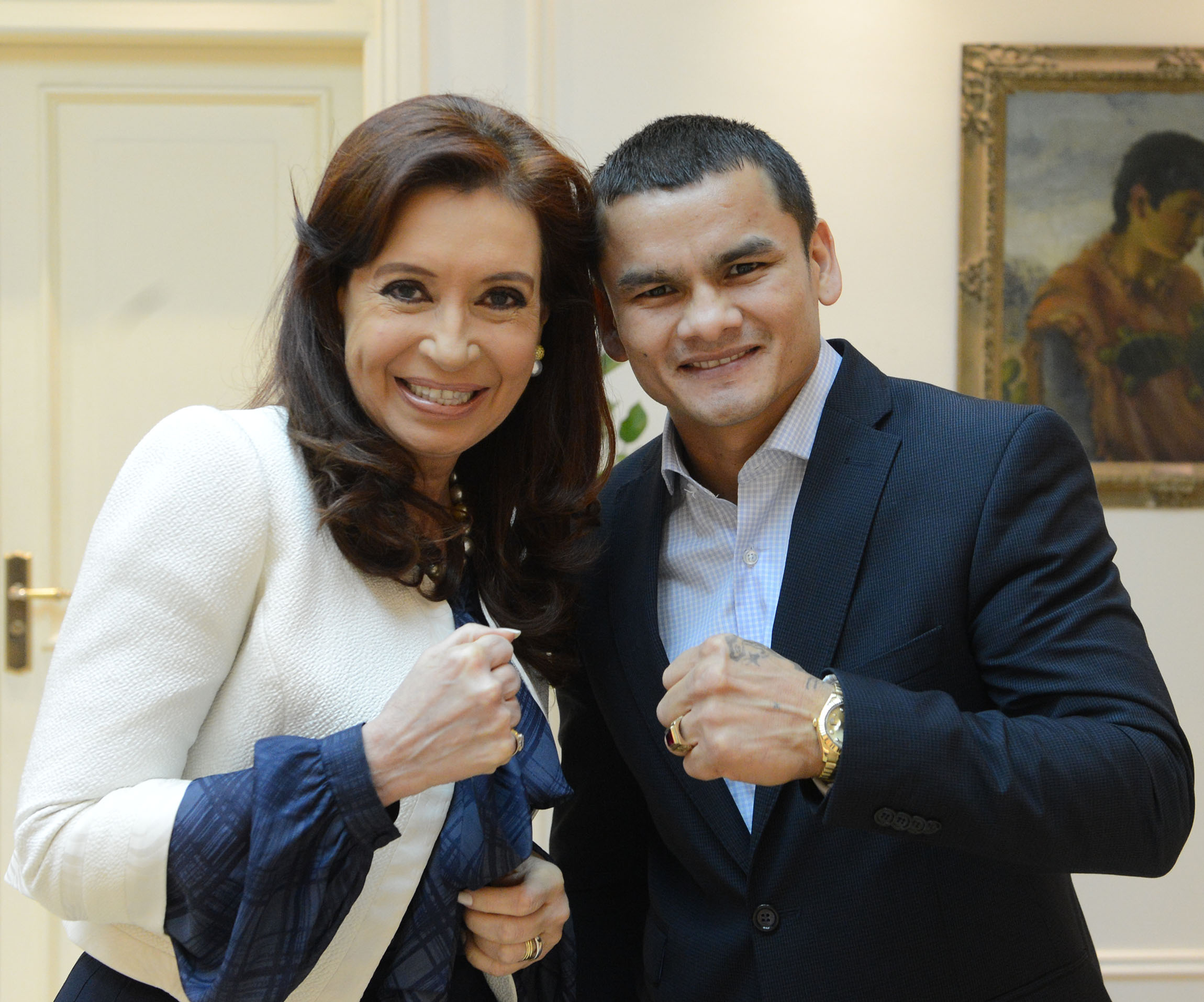 La presidenta Cristina Fernández recibe al boxeador Marcos "Chino" Maidana.